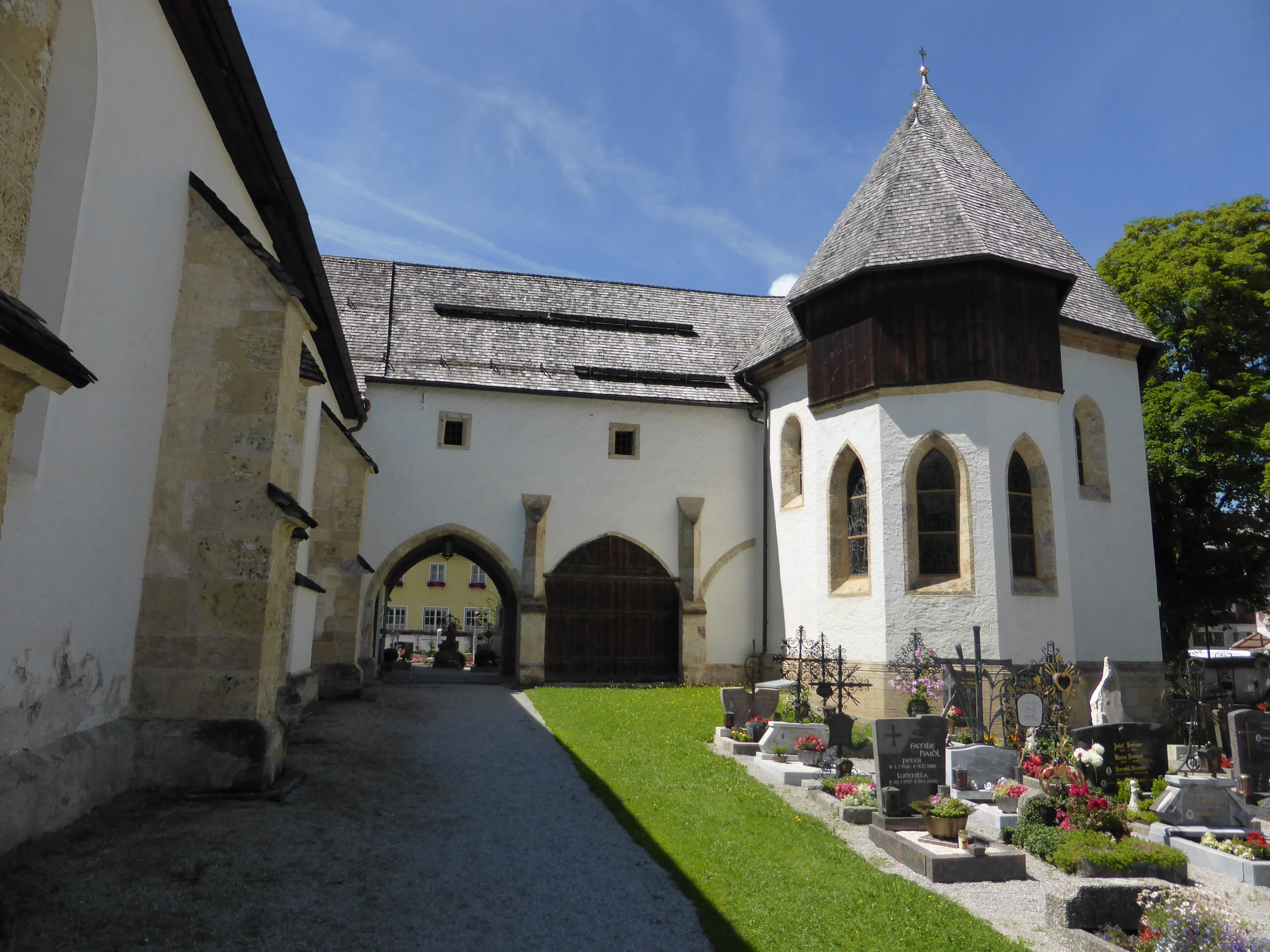 Karner, Anna-Kapelle